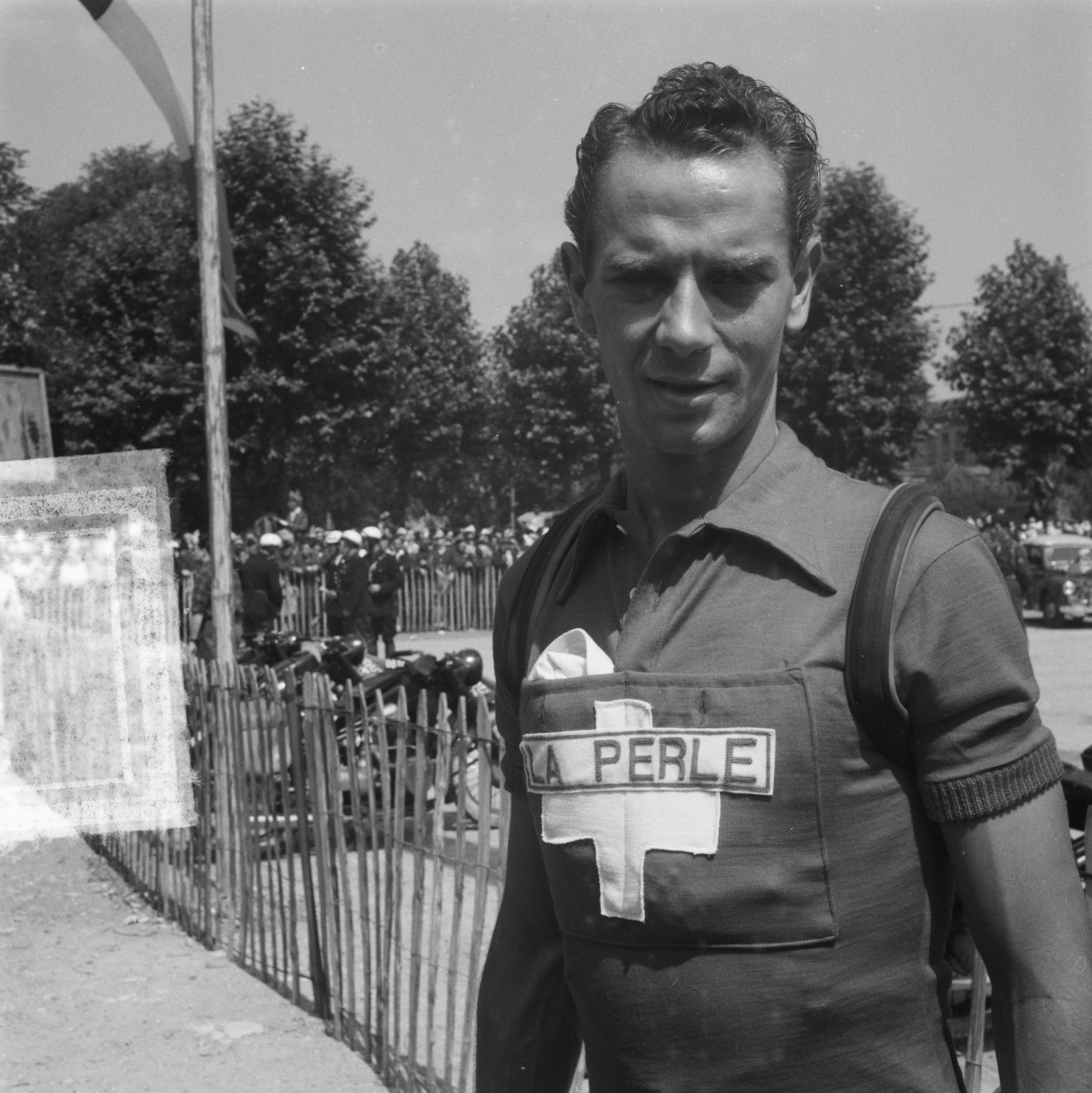 Tour de France. Hugo Koblet (Zwitserland)